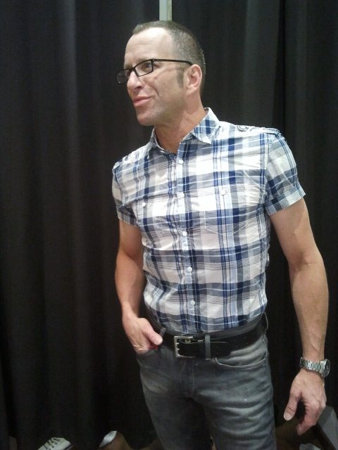 נתיב רובינזון